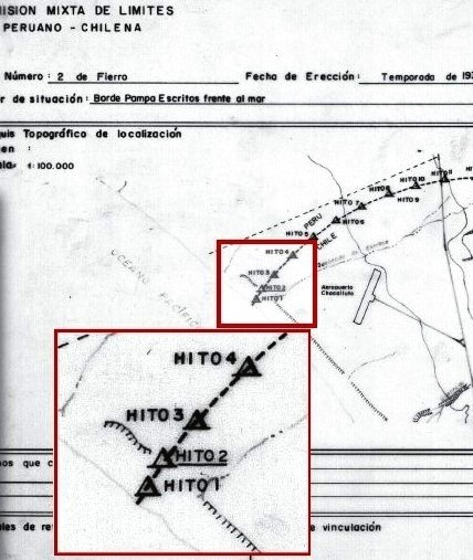 Croquis de la inspección del hito 2, en el limite terrestre entre Perú y Chile. Comisión mixta de límites peruano - chilena. Documento presentado por el Gobierno del Peru ante la Corte Internacional de Justicia en la Controversia Marítima (Perú v. Chile)